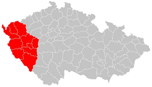 Západočeský kraj podle zákona č. 36/1960 Sb., o územním členění státu